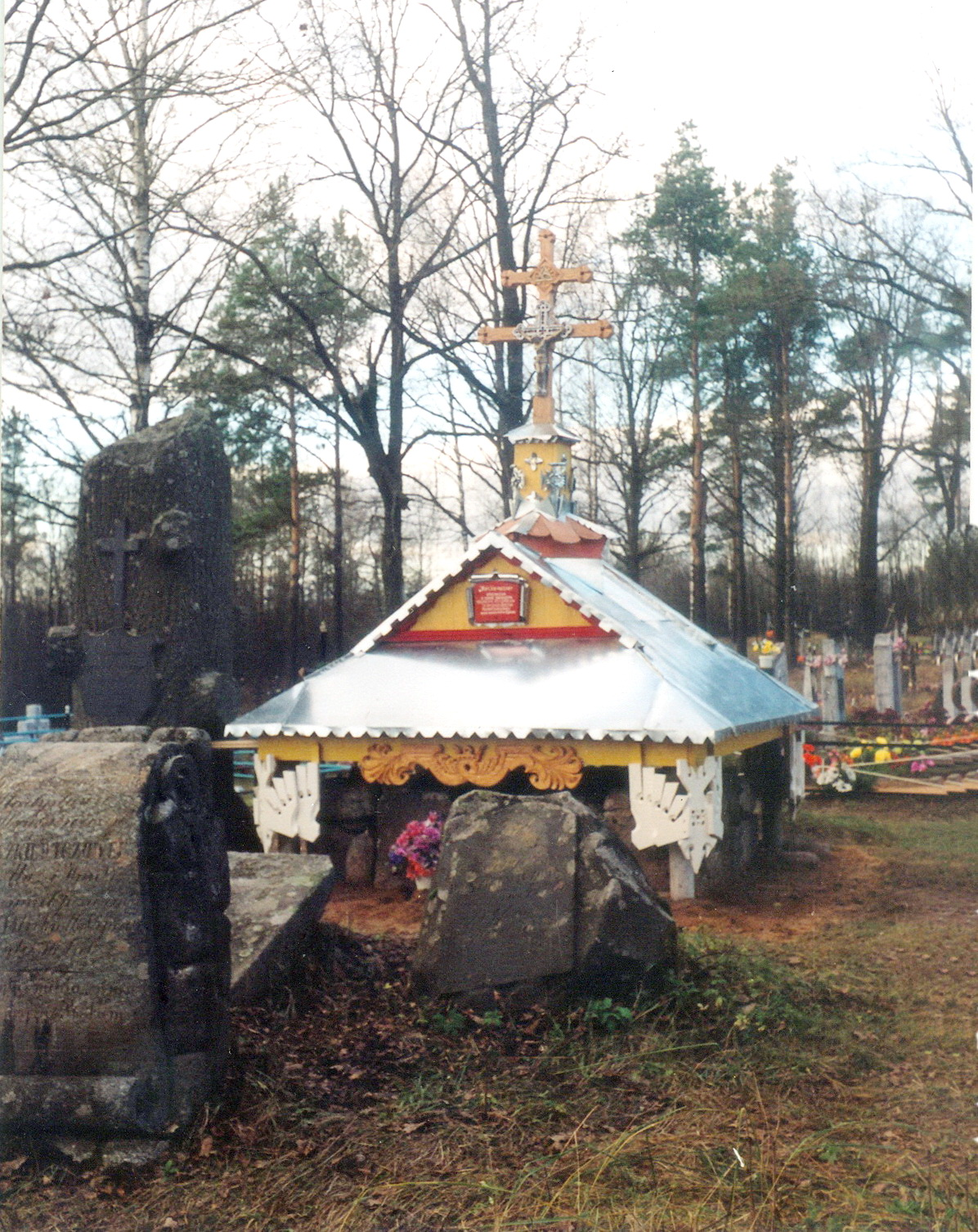 Капліца пашаны ў памяць палеглых змагароў-паўстанцаў за Айчыну ў 1794, 1831, 1863 гадах у вёсцы Страча Астравецкага раёна (2004)